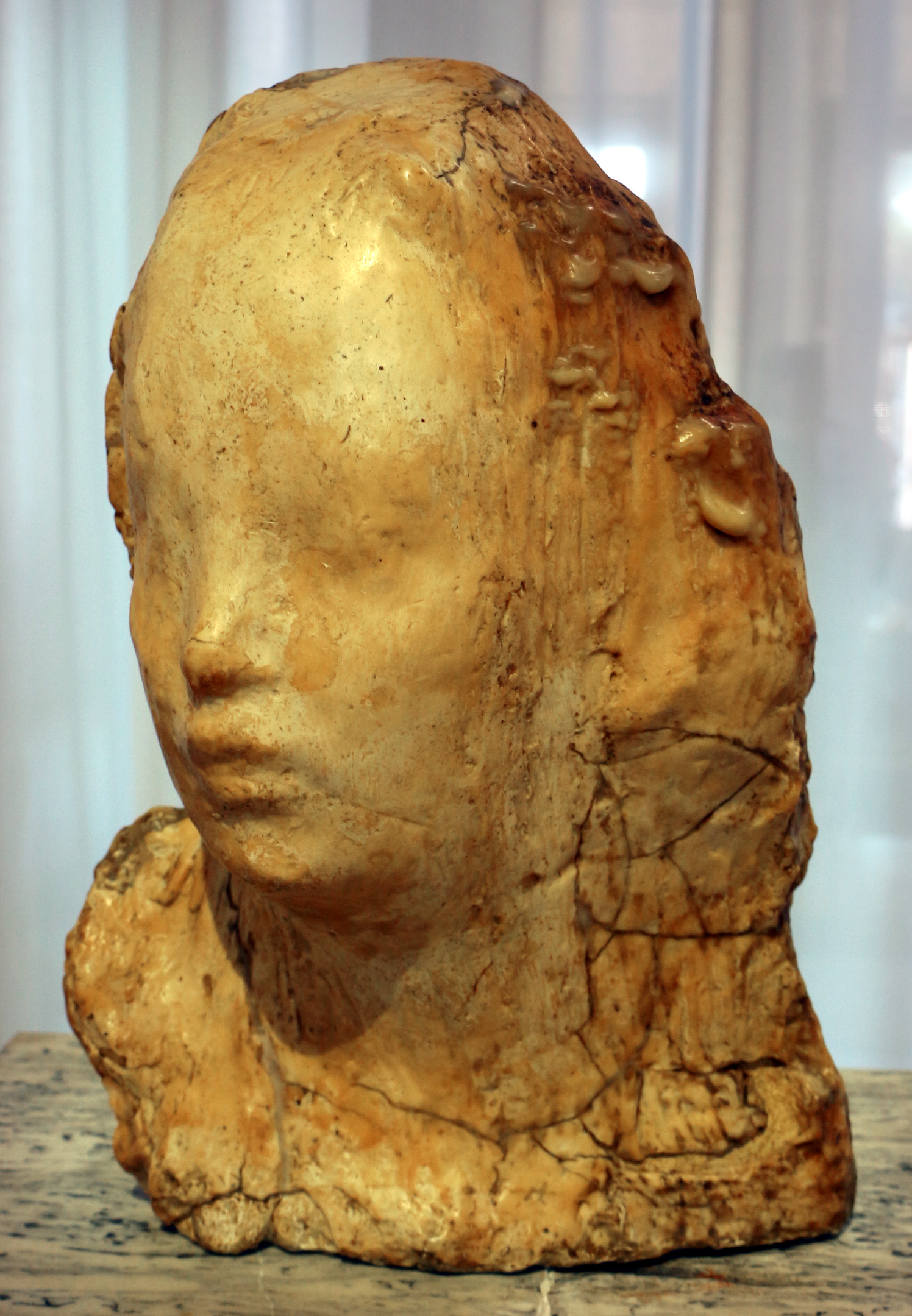 Sculptures in the Galleria nazionale d'arte moderna (Rome) This is a photo of a monument which is part of cultural heritage of Italy.